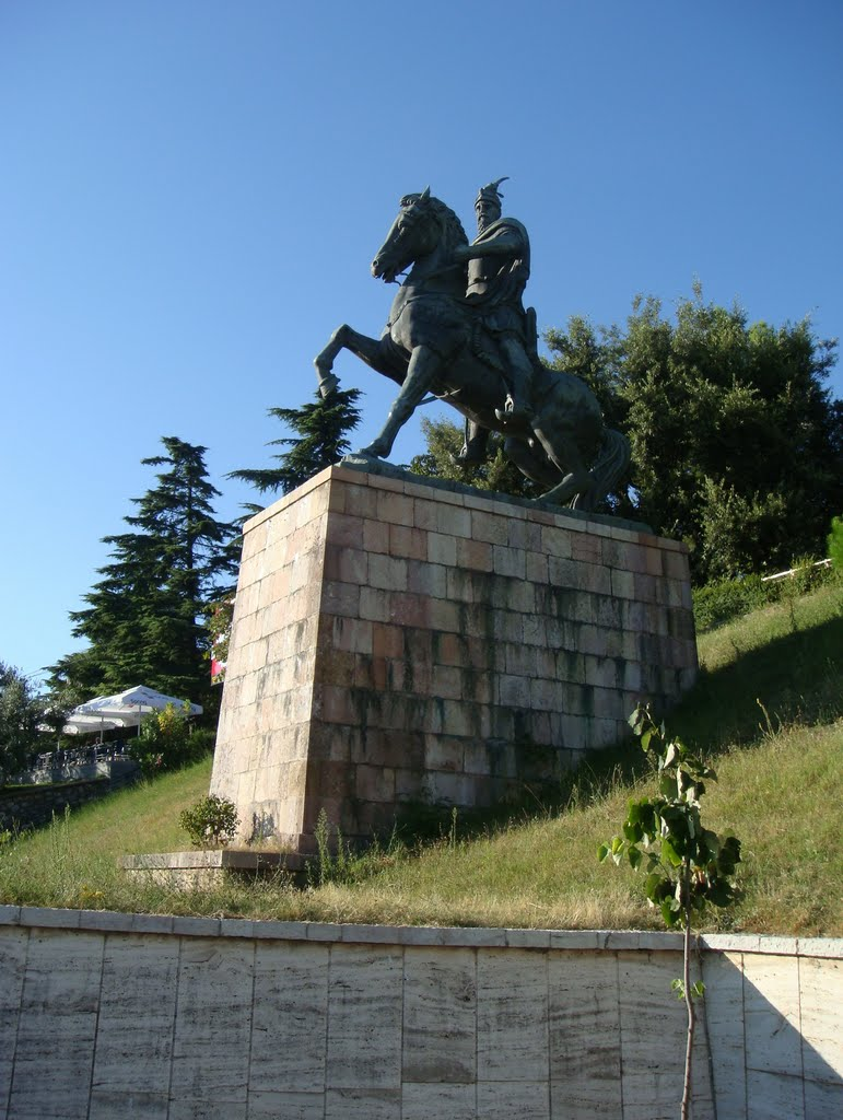 Monumenti i Heroit Kombëtar Gjergj Kastrioti